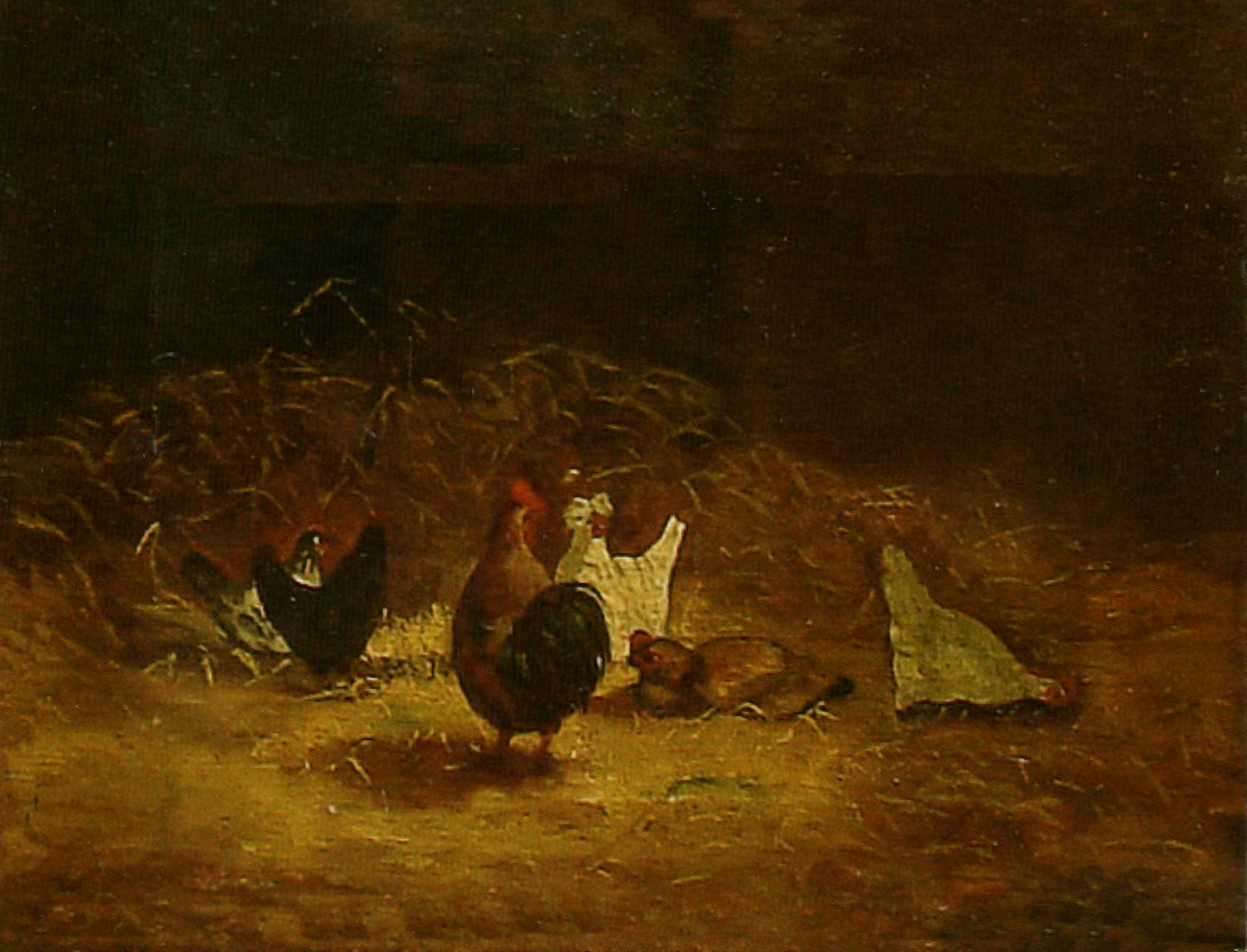 Gheorghe Tattarescu - Găini - Compoziţie miniaturală reprezentând o scenă de gen cu câteva găini într-un grajd, Muzeul Memorial "Gh. M. Tattarescu", 16,5x21,5 cm.